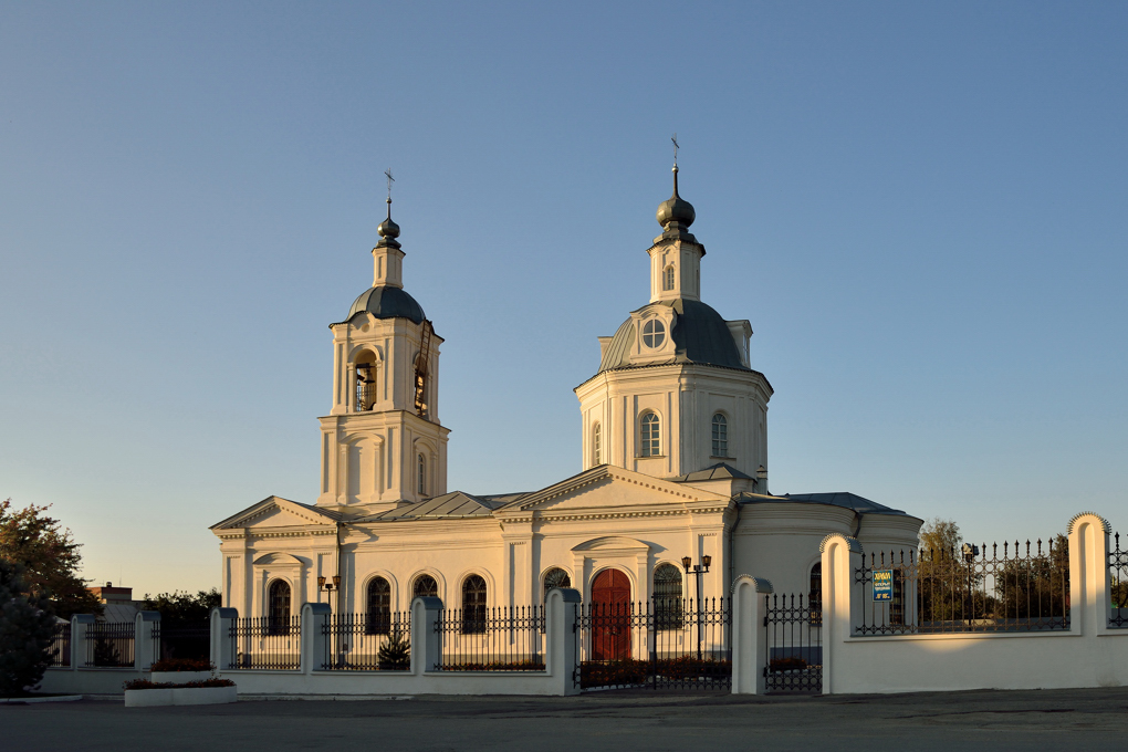 Церковь святителя Николая (Тульская область, Алексин, Советская улица, 43)